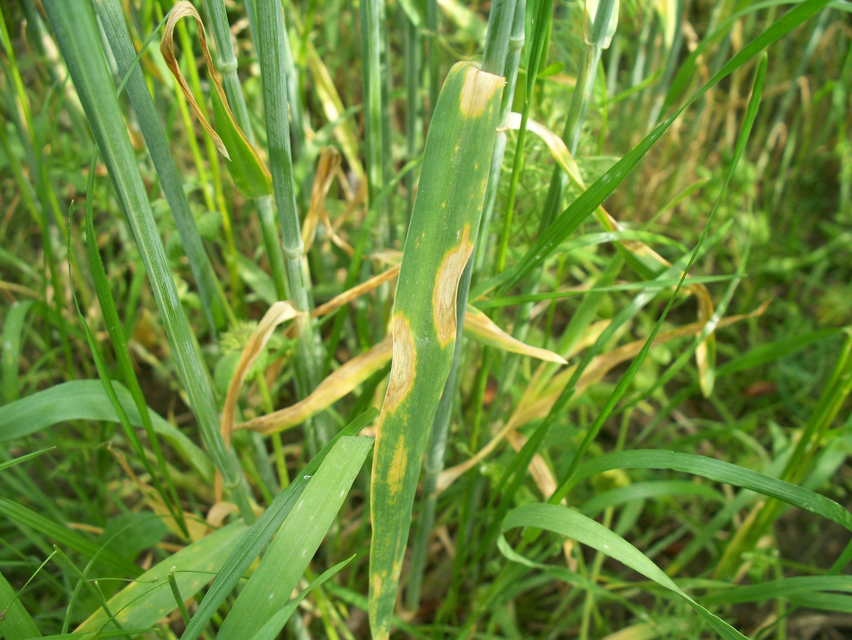 Rynchosporioza zbóż na życie. Żyto mieszańcowe.